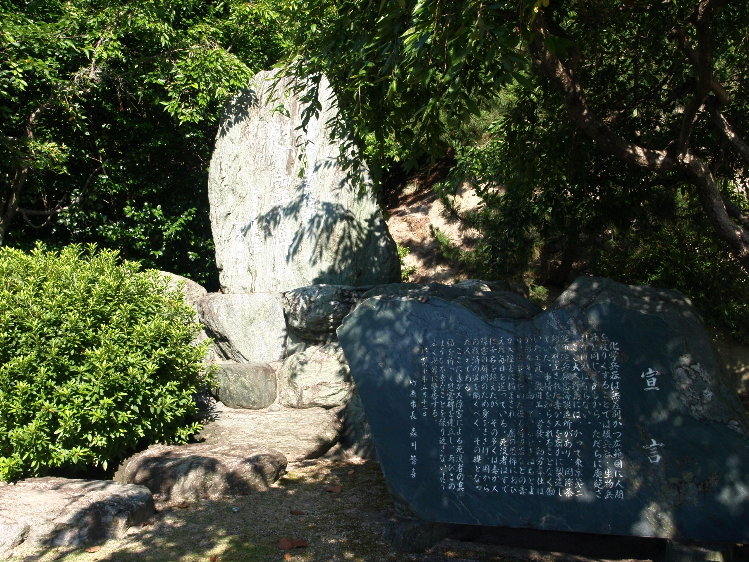 大久野島慰霊碑